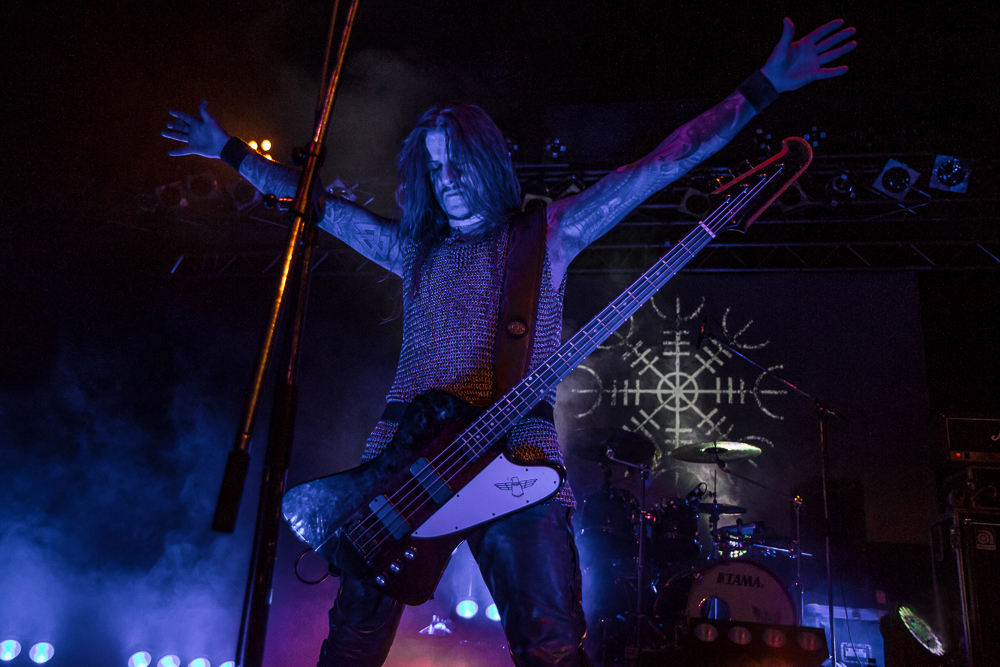 Helheim - Niflheim 2013 - 02-03-2013